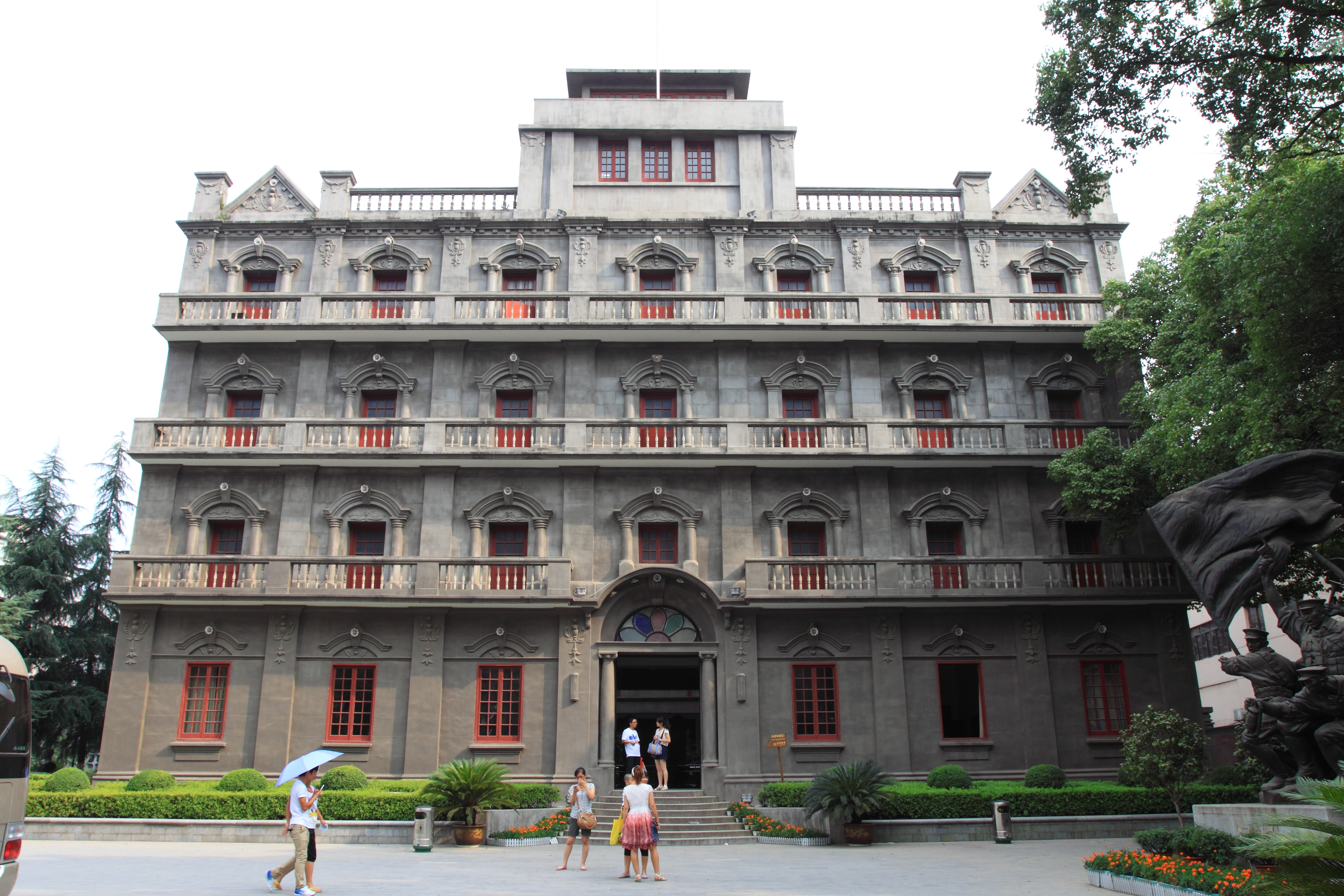 南昌八一起义纪念馆（原江西大旅社），位于中国江西省南昌市。